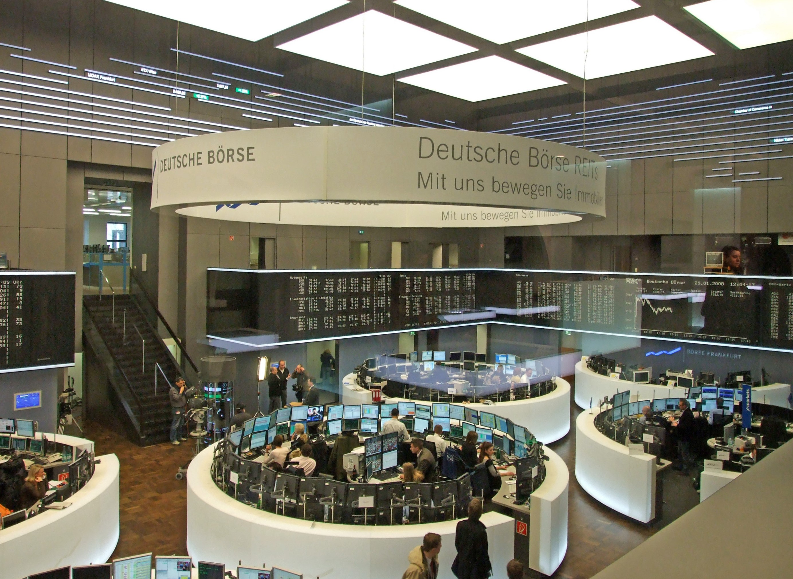 Parkett-Boerse in Ffm